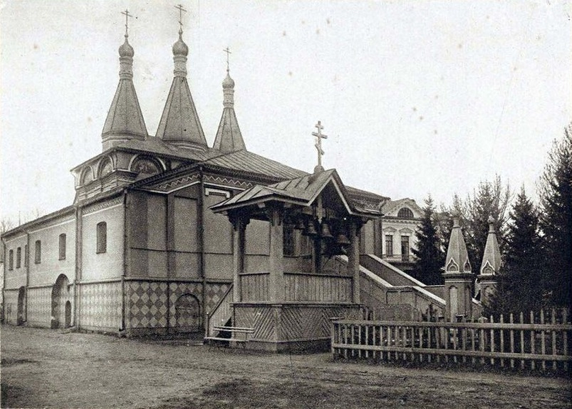 Церковь Похвалы Пресвятой Богородицы со звонницей